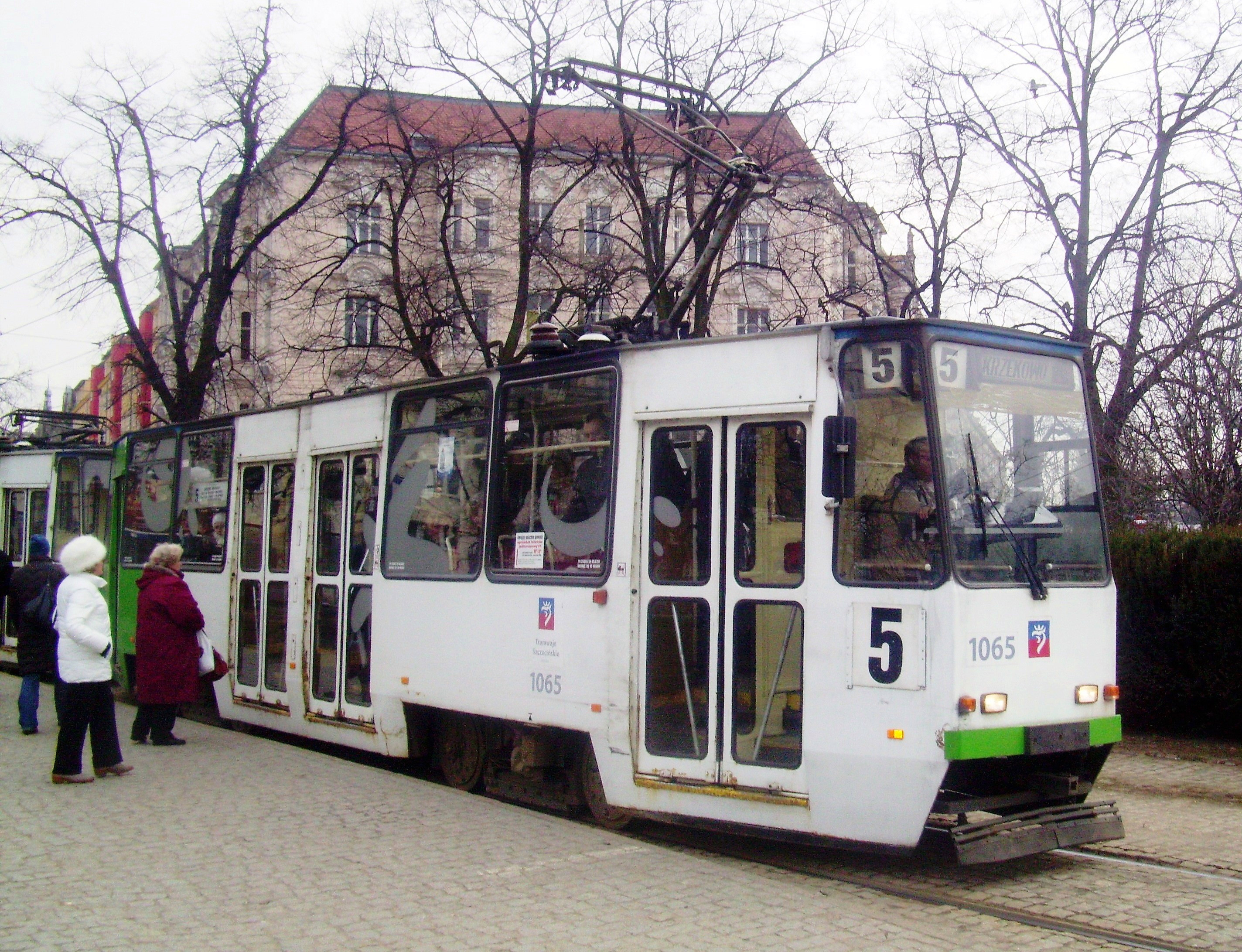 Tramwaj w Szczecinie, 2011